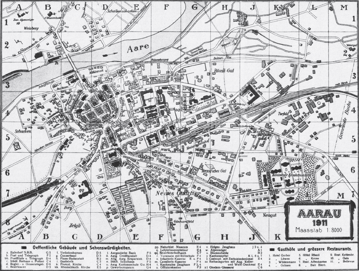 Stadtplan von Aarau aus dem Jahr 1911